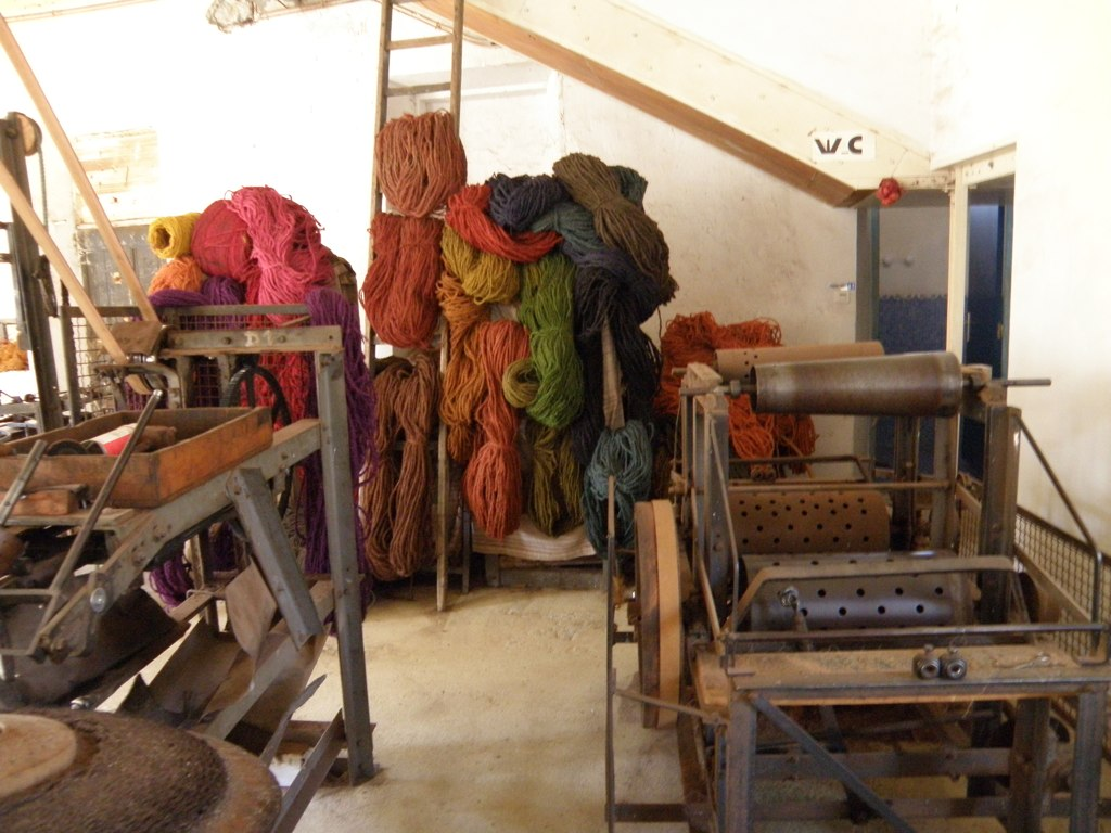 Machines et matière première des scourtins Scourtinerie à Nyons